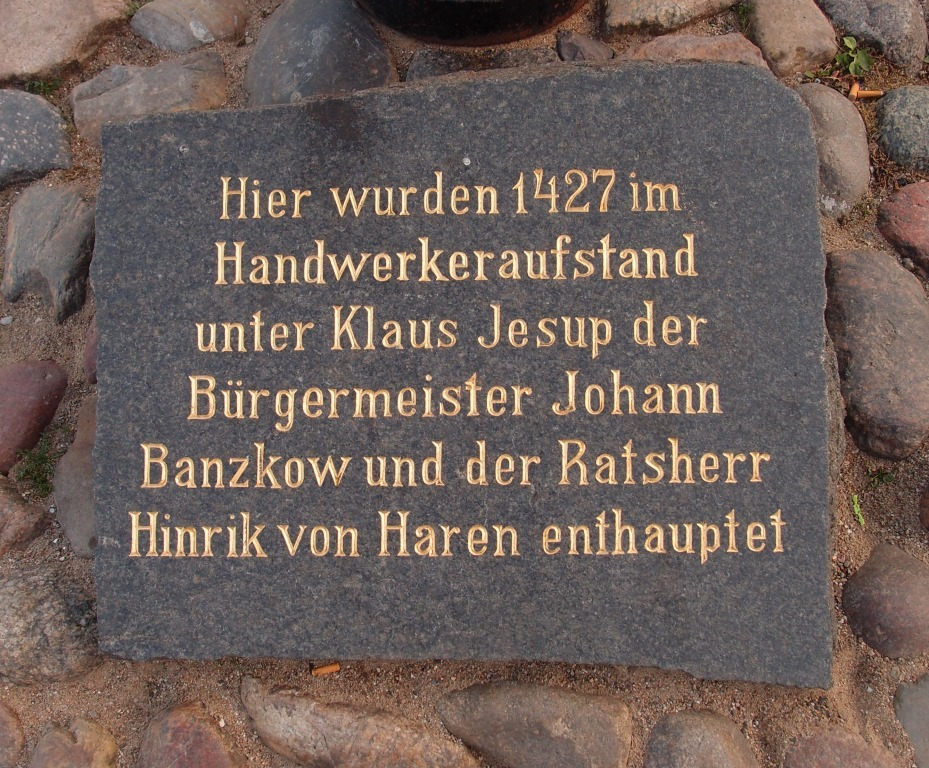 Tafel für den Kaufmann und Bürgermeister der Hansestadt Wismar Johann Bantzkow (hingerichtet 1427) auf dem Marktplatz in Wismar